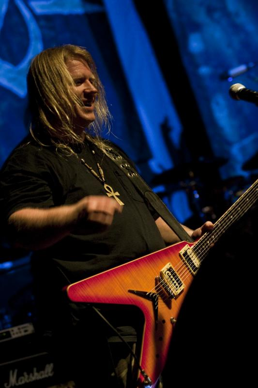 Nile Live @ Santana Hall - 18/03/2010 - São Paulo, Brasil É proibida a cópia ou reprodução deste material sem a autorização do autor. Por favor, não publique nada daqui sem o devido crédito. Fotógrafo: Alexandre Cardoso